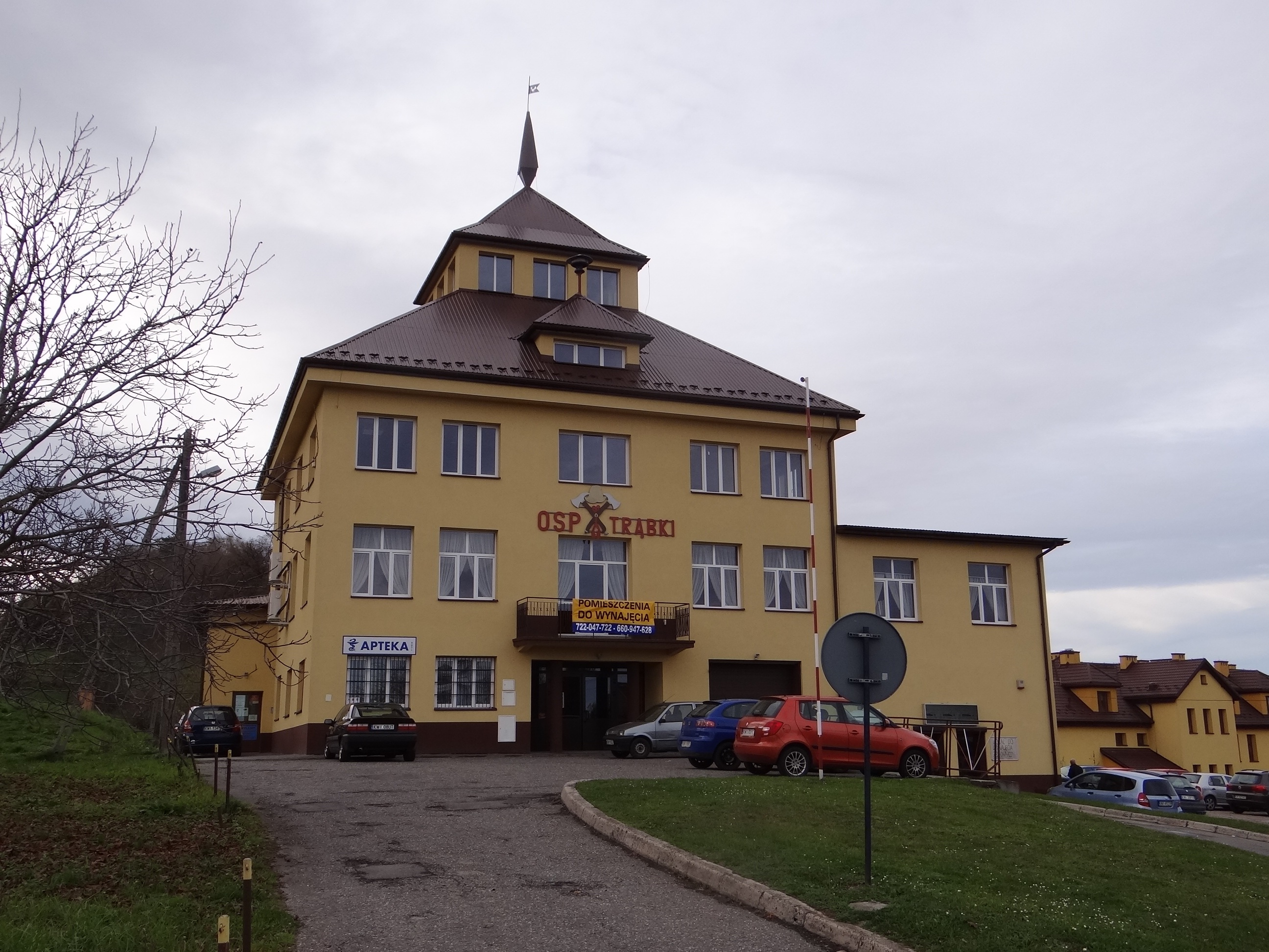 Remiza OSP w Trąbkach